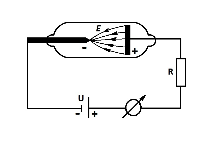 Схема подключения диода с холодным катодом.